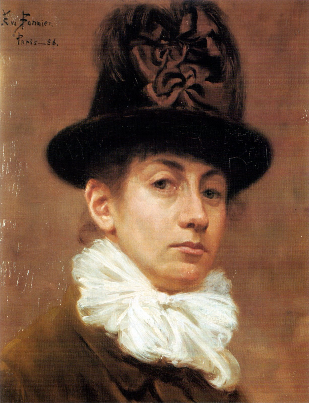 Self-portrait